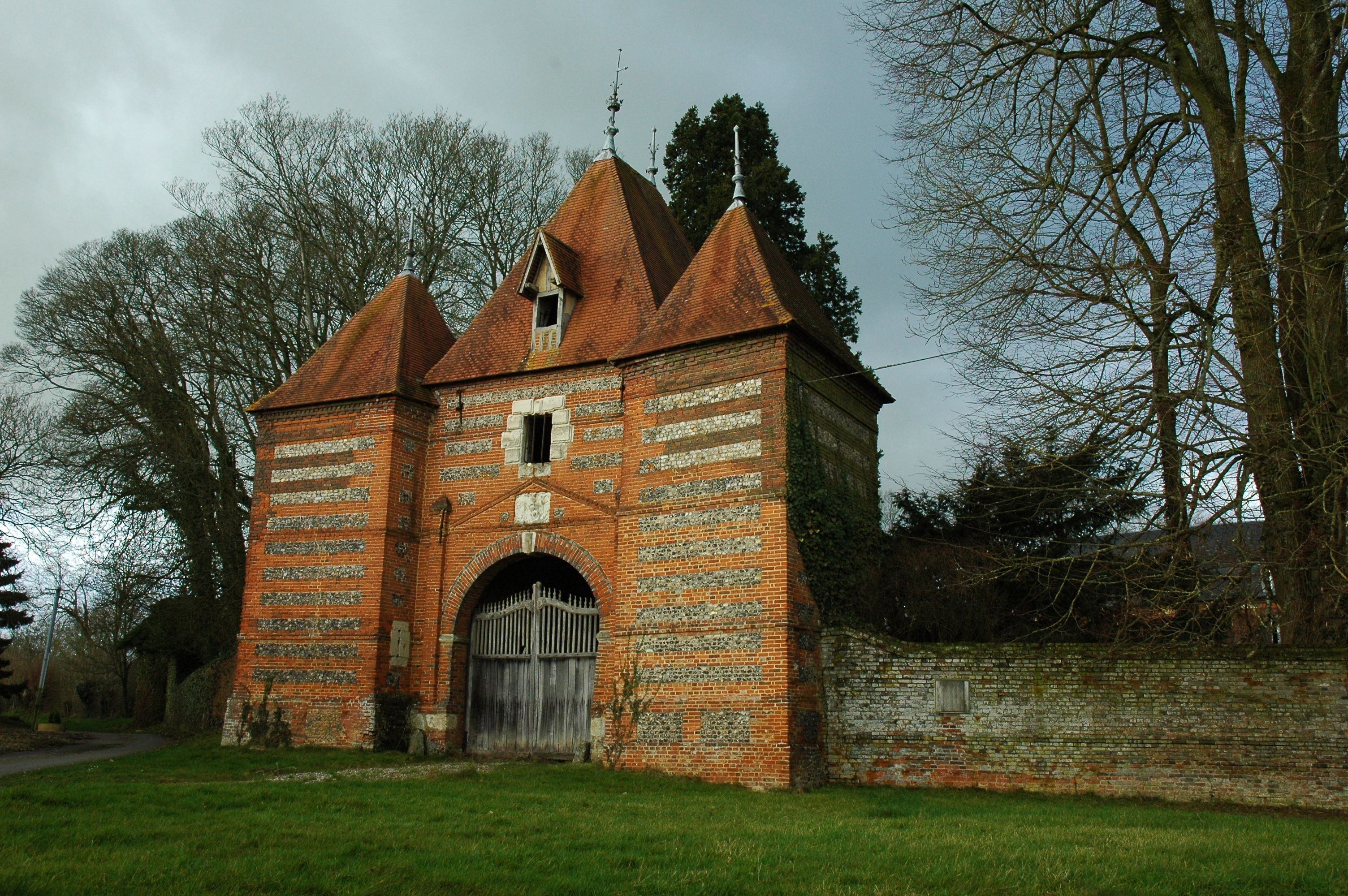 Auvilliers (Seine-Maritime, France). Le portail du château. .